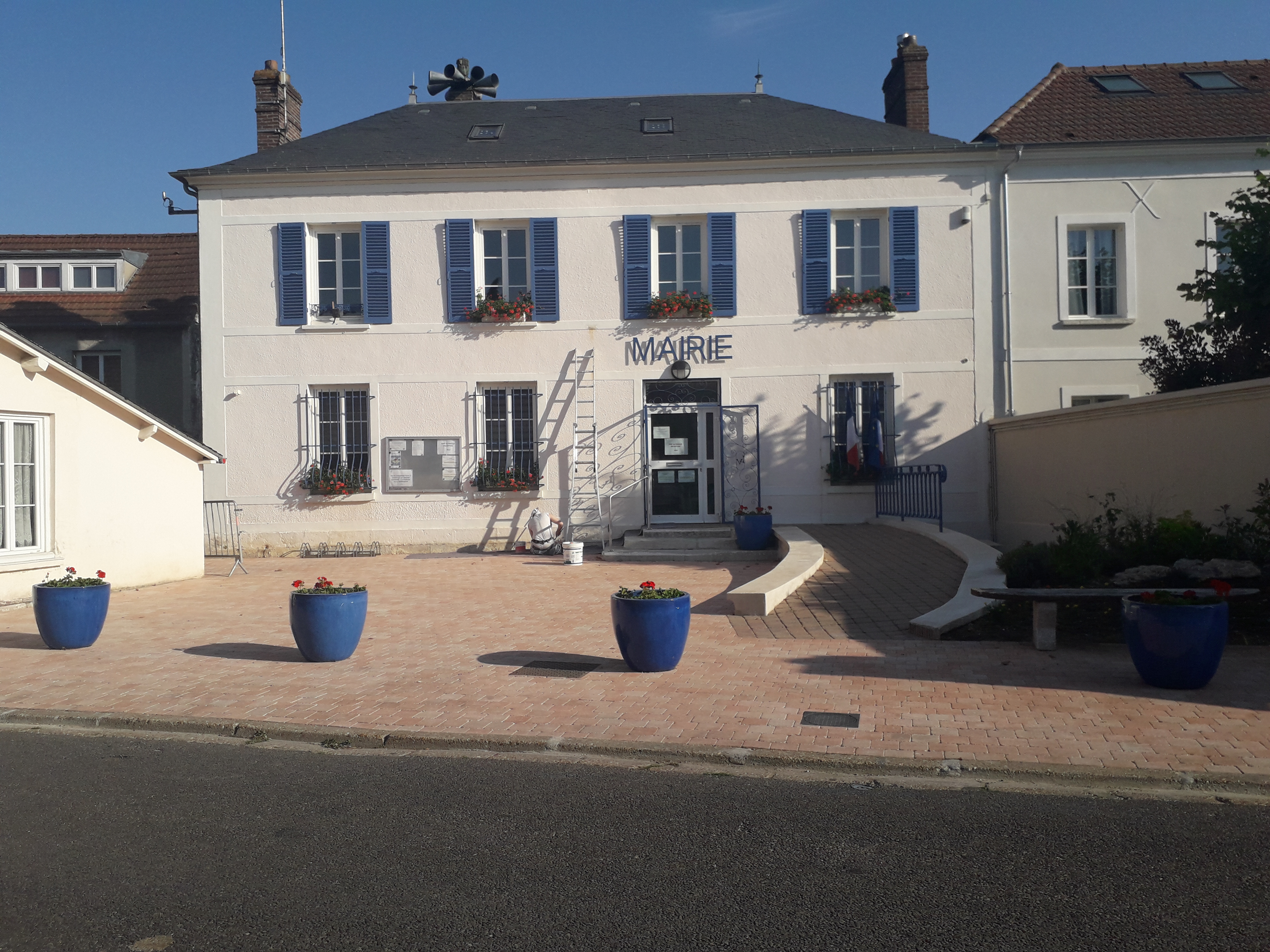 Mairie de Limetz-Villez après les restaurations de 2019-2020